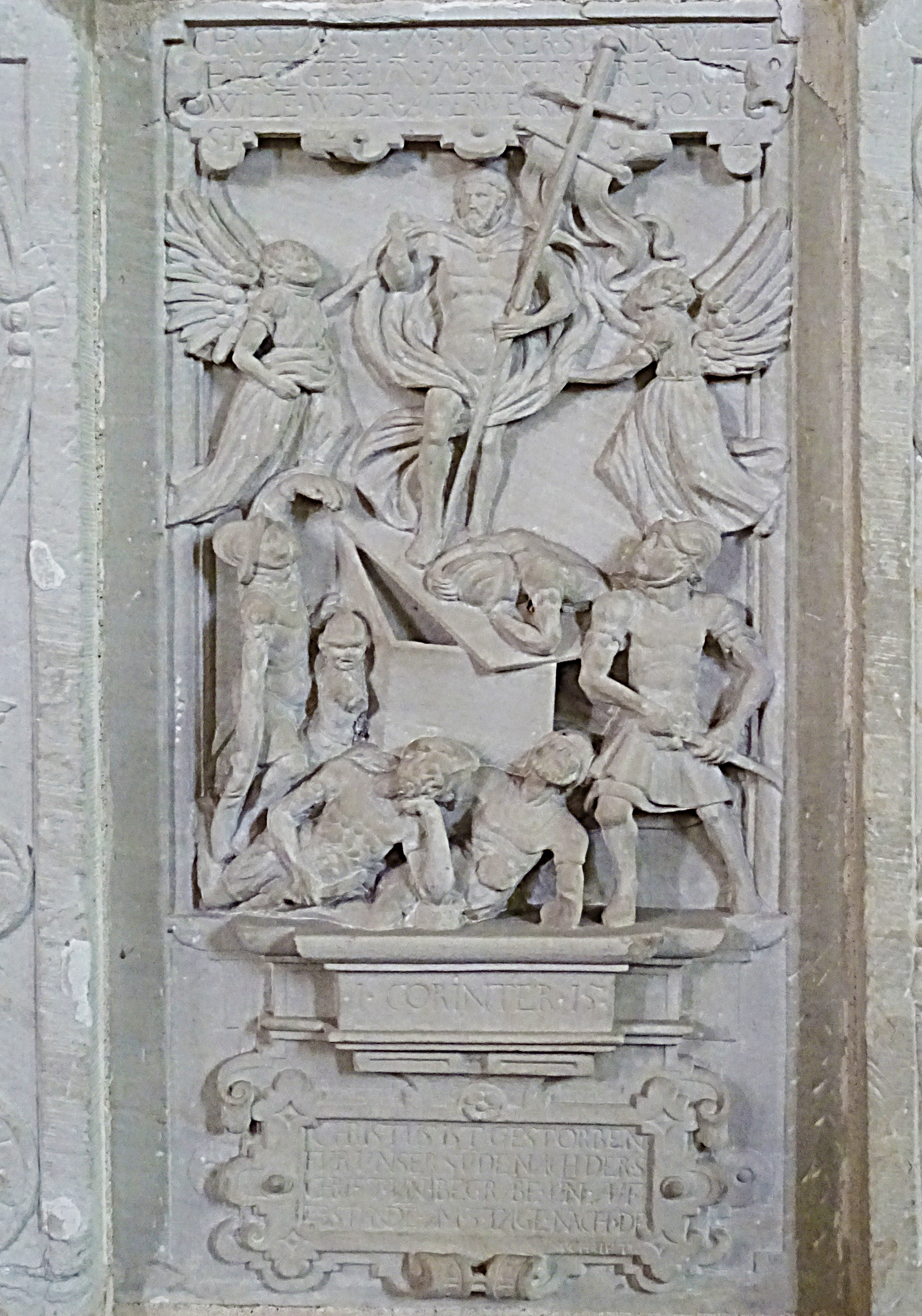 Steinbilderbibel in der St. Annenkirche (Eisleben), 02/29, Auferstehung Christi